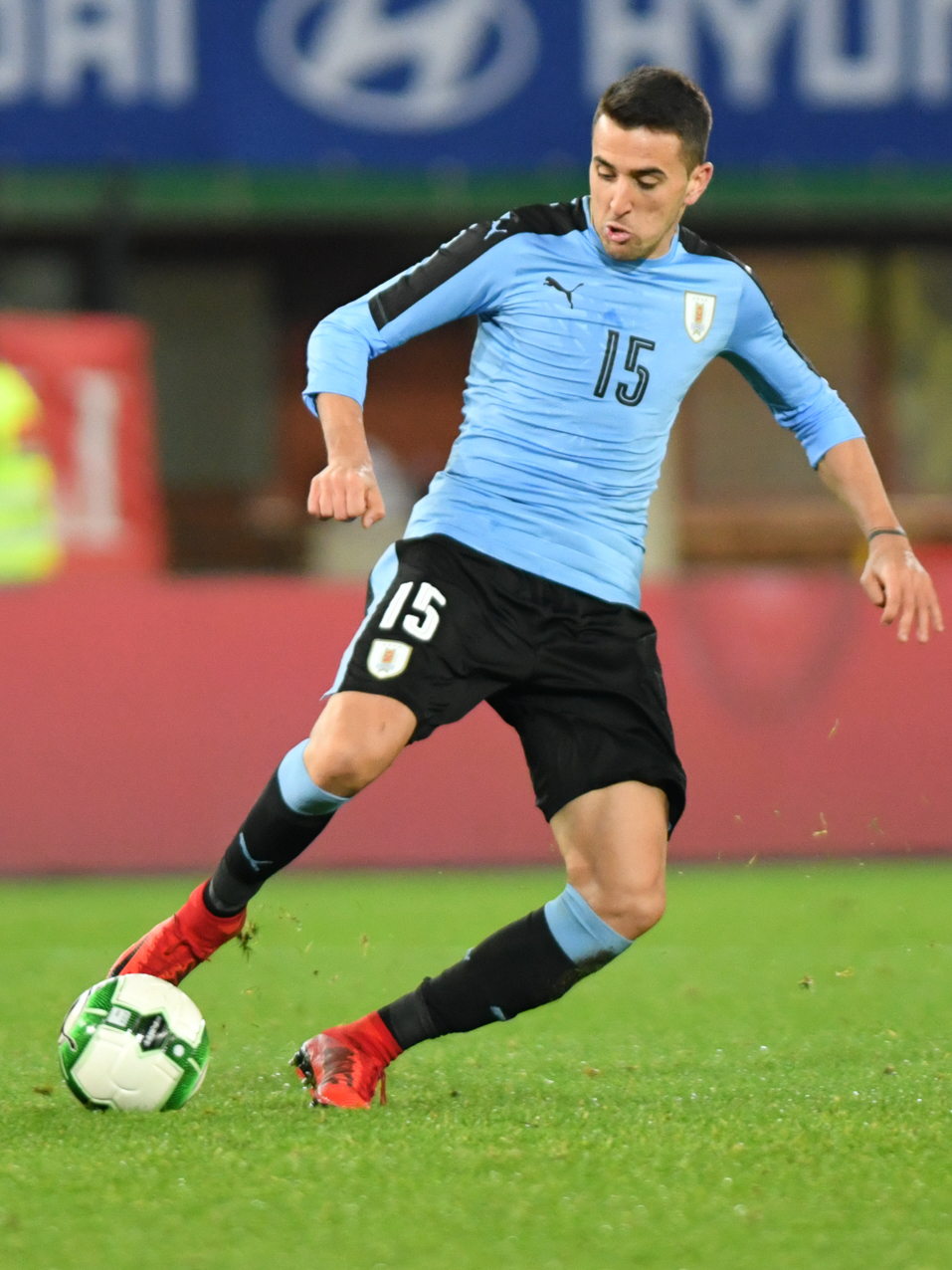 Wien, Österreich, 14.11.2017, Sport, Fussball, OEFB Freundschaftliches Laenderspiel - Österreich vs Uruguay. Bild zeigt Matias Vecino (URU).